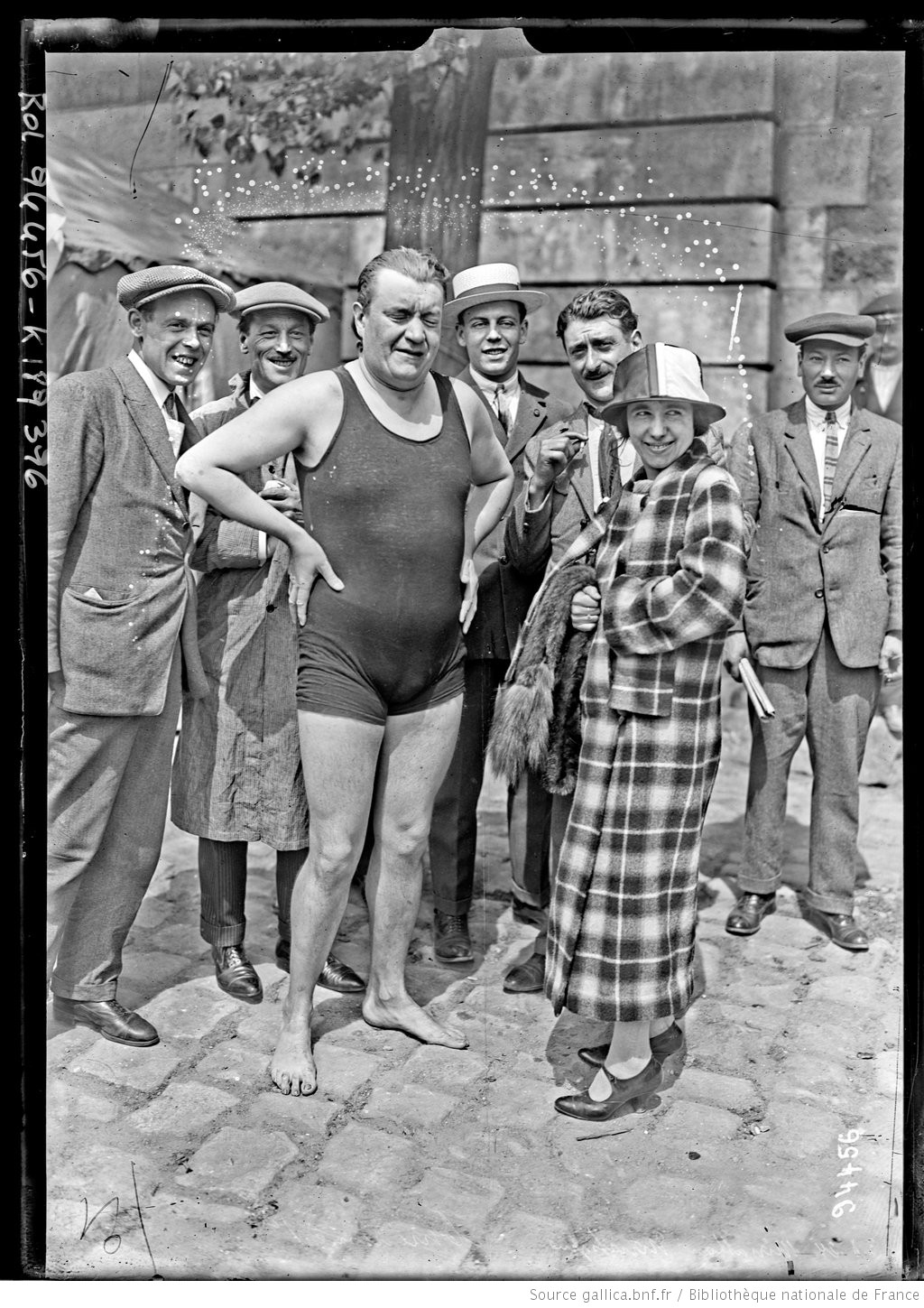 le nageur Chrétien pose en 1924.